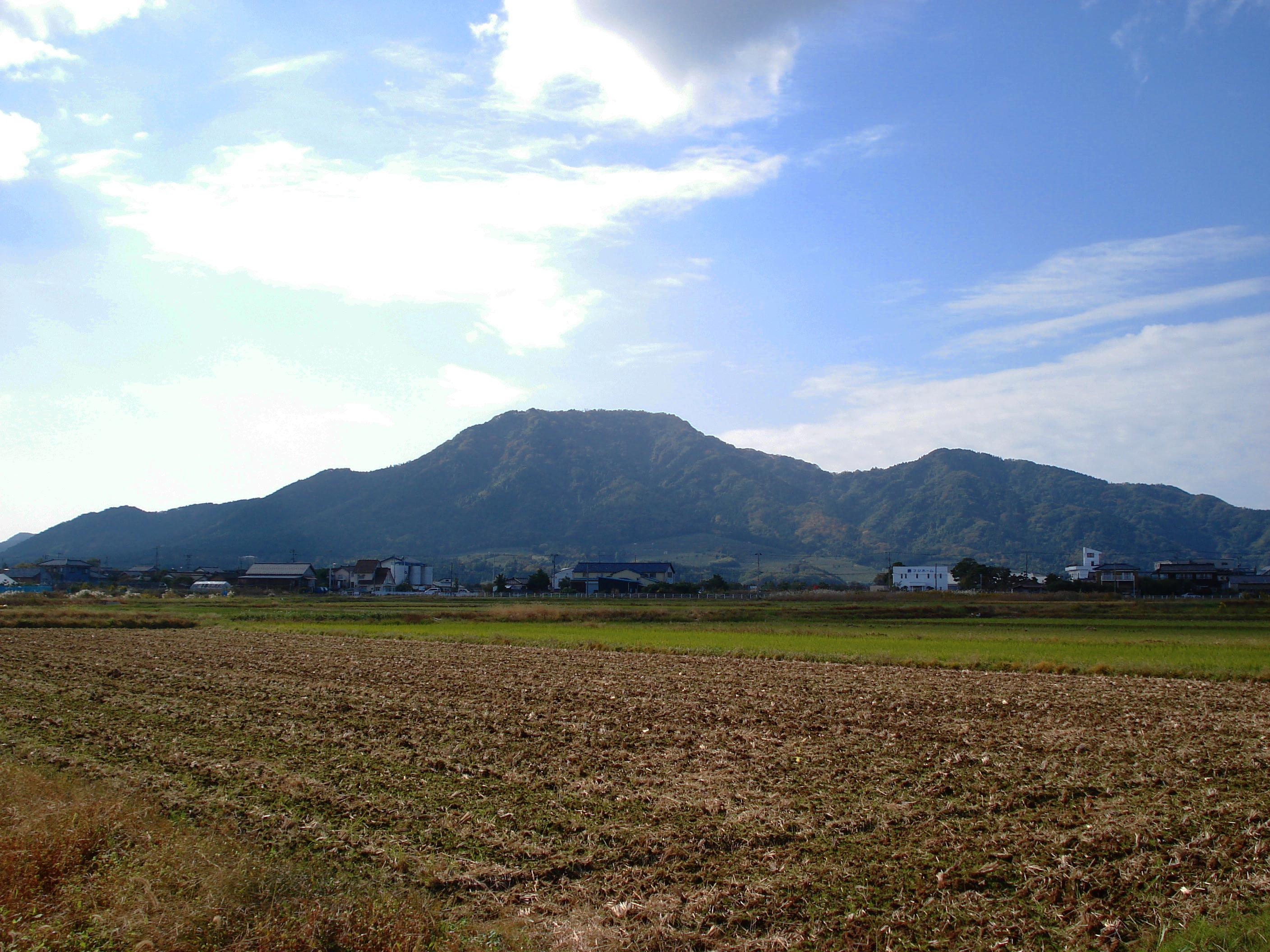 角田山, 新潟県新潟市